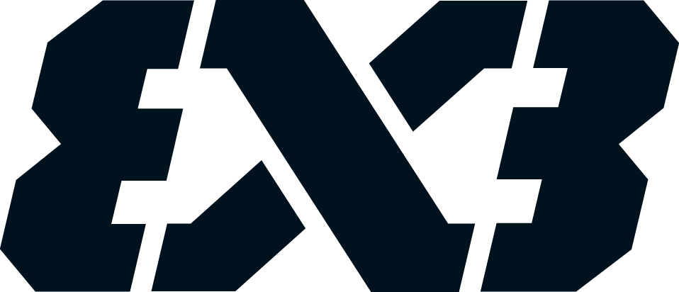 Logo 3x3 FIBA